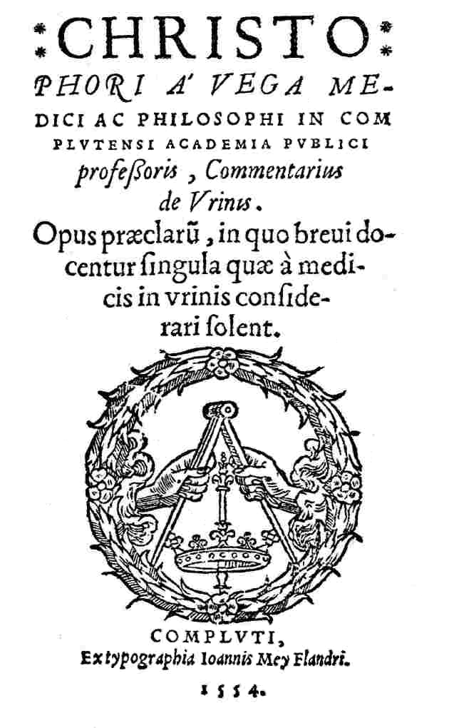 Portada del libro Commentarius de vrinis. Publicado por Cristóbal de Vega en Alcalá de Henares, en 1554.